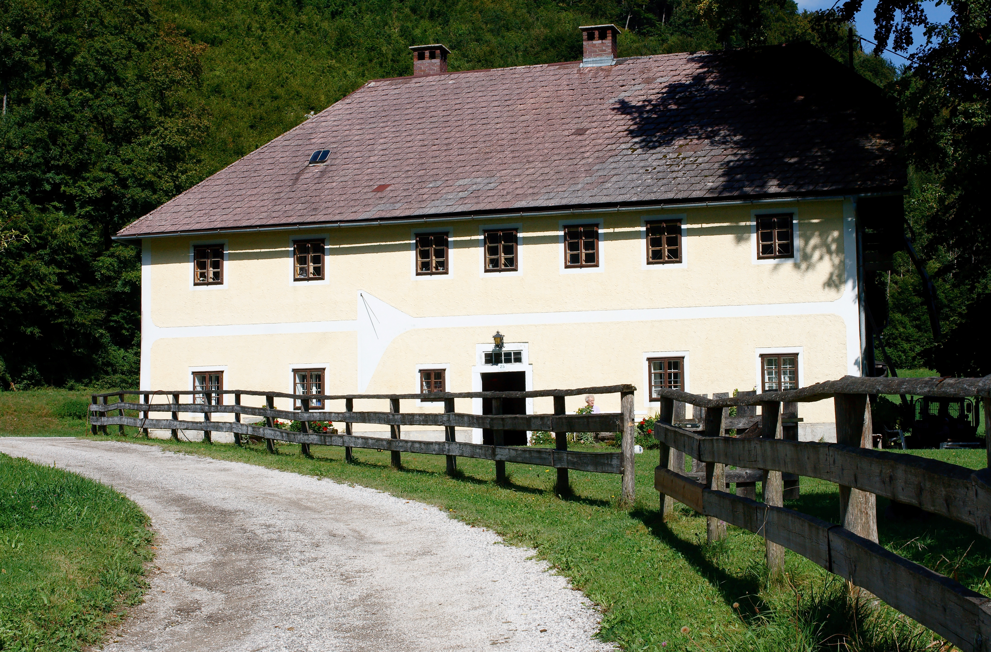 Der Bauernhof Hoisleiten im Ensemble Schmiedleithen (Grünburg, Oberösterreich)